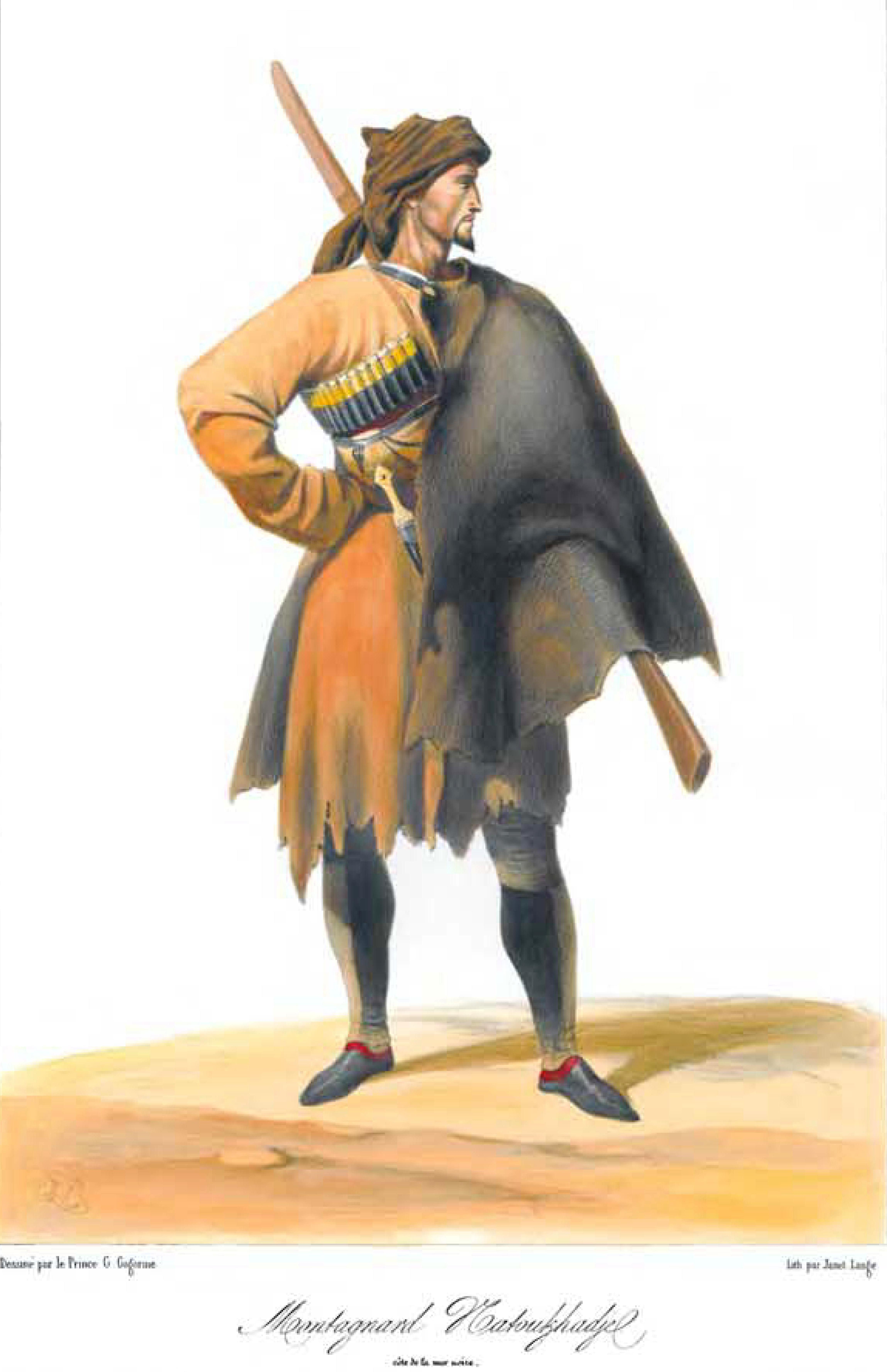 Scènes, paysages, moeurs et costumes du Caucase dessinés d'aprés nature par le prince G. Gagarine.